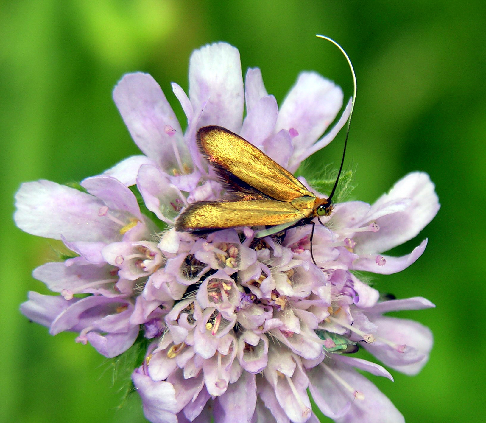 Nemophora metallica, female